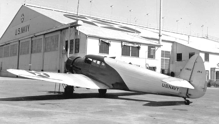 FairchildJK1